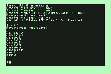 GeckOS 2.0 Shell